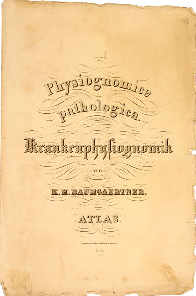 Karl Heinrich Baumgärtner Krankenphysiognomik 1839 Titel